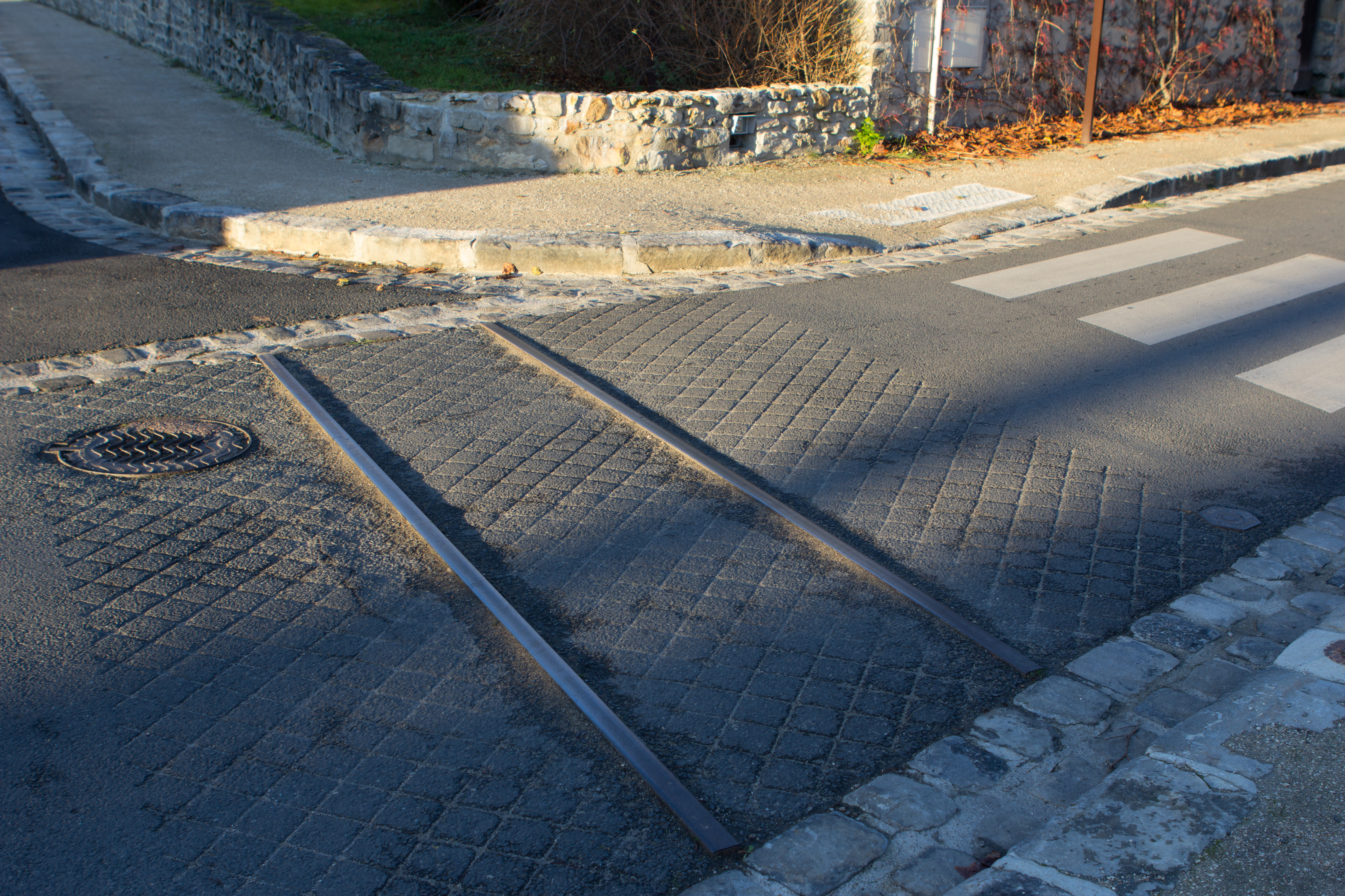 Tramway Sud de Seine-et-Marne - Tronçon de voie reposée à Fleury-en-Bière (Seine-et-Marne, France).